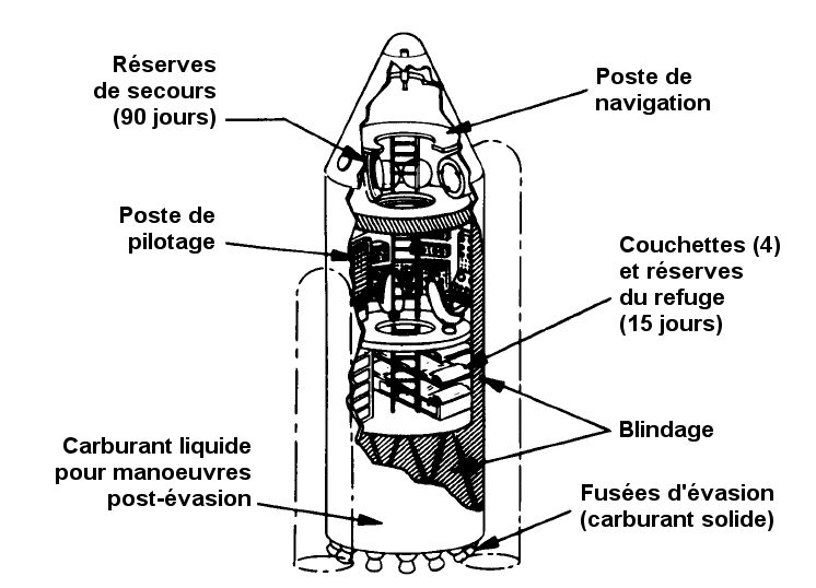 Dans le cas de missions pilotées, il est nécessaire de prévoir une zone de l'habitacle protégée des radiations du moteur en fonctionnement, comprenant donc le poste de pilotage. Ce refuge serait également utilisé en cas d'éruption solaire. Le reste de l'habitacle n'est protégé qu'envers le rayonnement ambiant du milieu interplanétaire. L'objectif est qu'au cours d'une mission, l'équipage ne subisse pas plus de 50 rem de la part du moteur et 50 rem du milieu spatial. La stratégie adoptée consiste à situer ce poste de pilotage / refuge dans le véhicule de secours. Son blindage contre les radiations solaires serait uniforme tandis que le blindage supplémentaire vis-à-vis de la propulsion, placé uniquement sur le "bas" du refuge, serait en grande partie constitué par le carburant de secours. Le reste du véhicule de secours n'a pas besoin de protection importante, cela concerne le poste de navigation et les réserves logistiques (seulement 15 jours de réserves sont nécessaires au sein du refuge). Cette conception impose que les passages entre le poste de commande et le reste du vaisseau se fasse par les cotés du véhicule. Les autres modules sont consacrés au déroulement normal de la mission (laboratoires, véhicules d'exploration, gymnase, mess, atelier, magasins de pièces de rechange, ...).